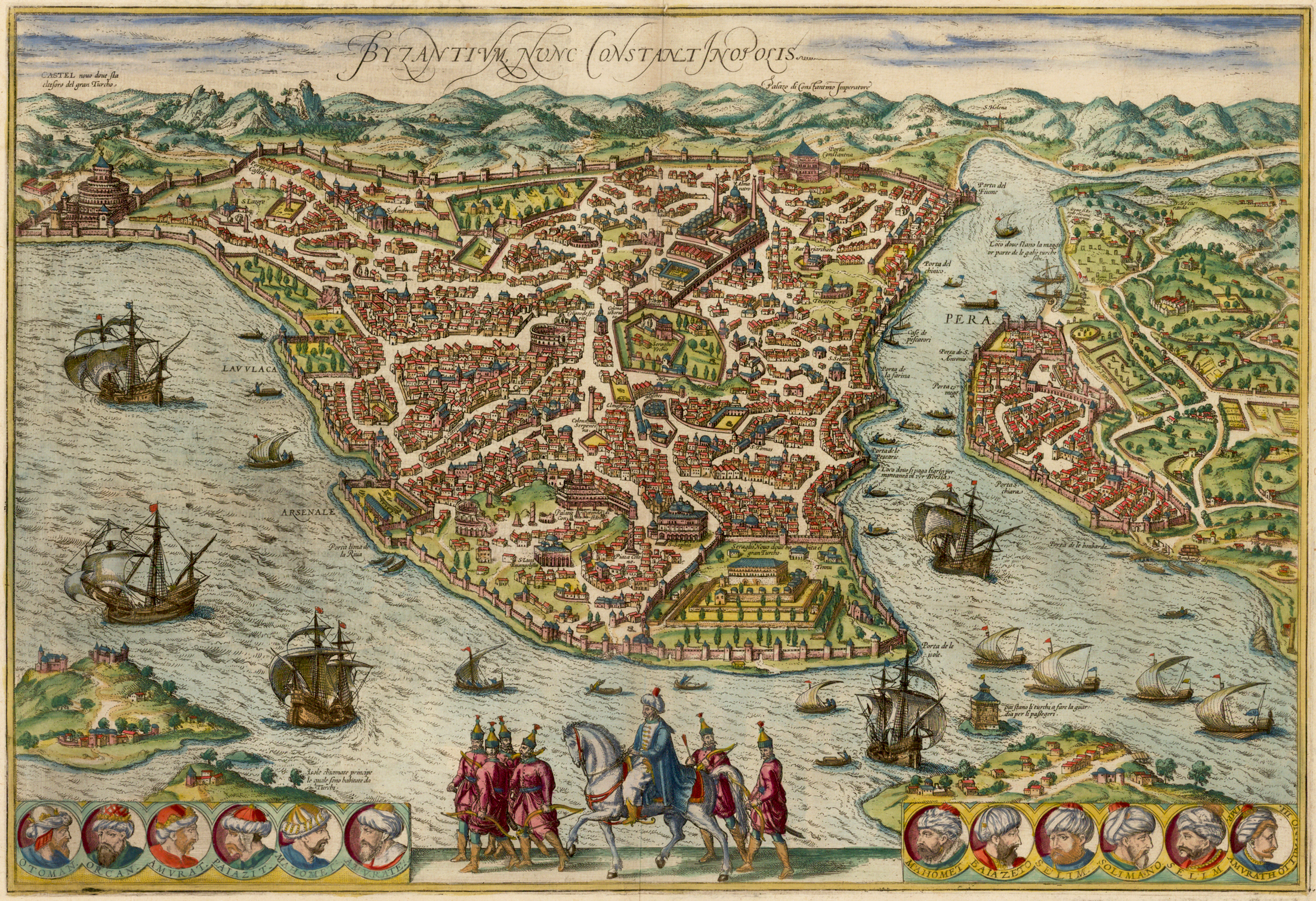 Byzantium / Constantinopolis